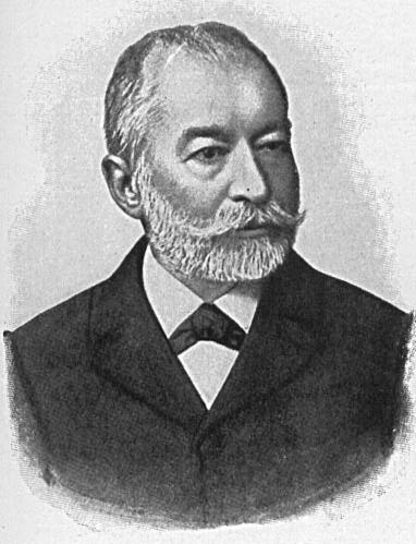 Image of Dimitrie Alexandru Sturdza (1833 - 1914), Romanian politician, Prime Ministers 1895-1896, 1897-1899, 1901-1906 and 1907-1909